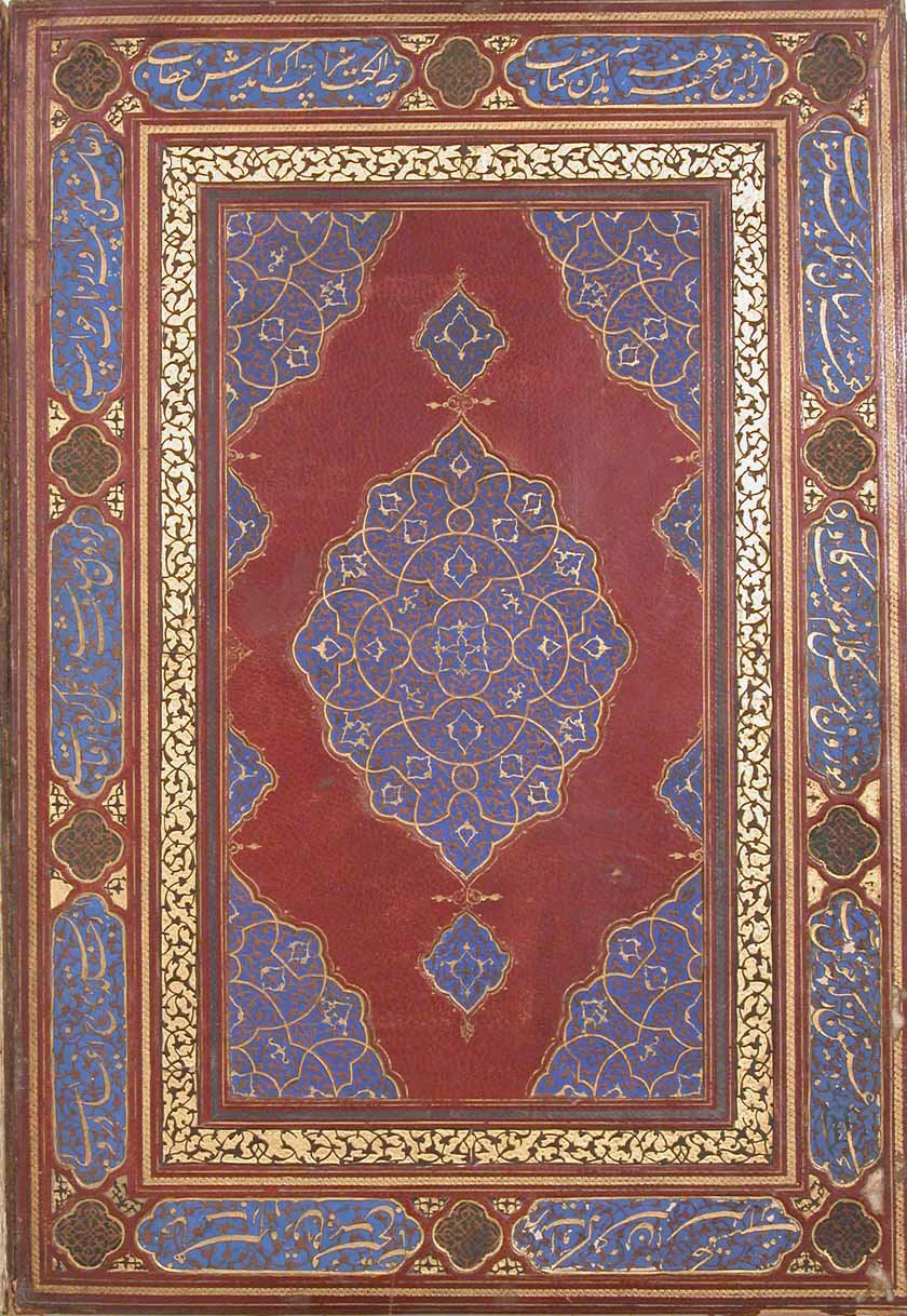 Illustrated manuscript; Codices